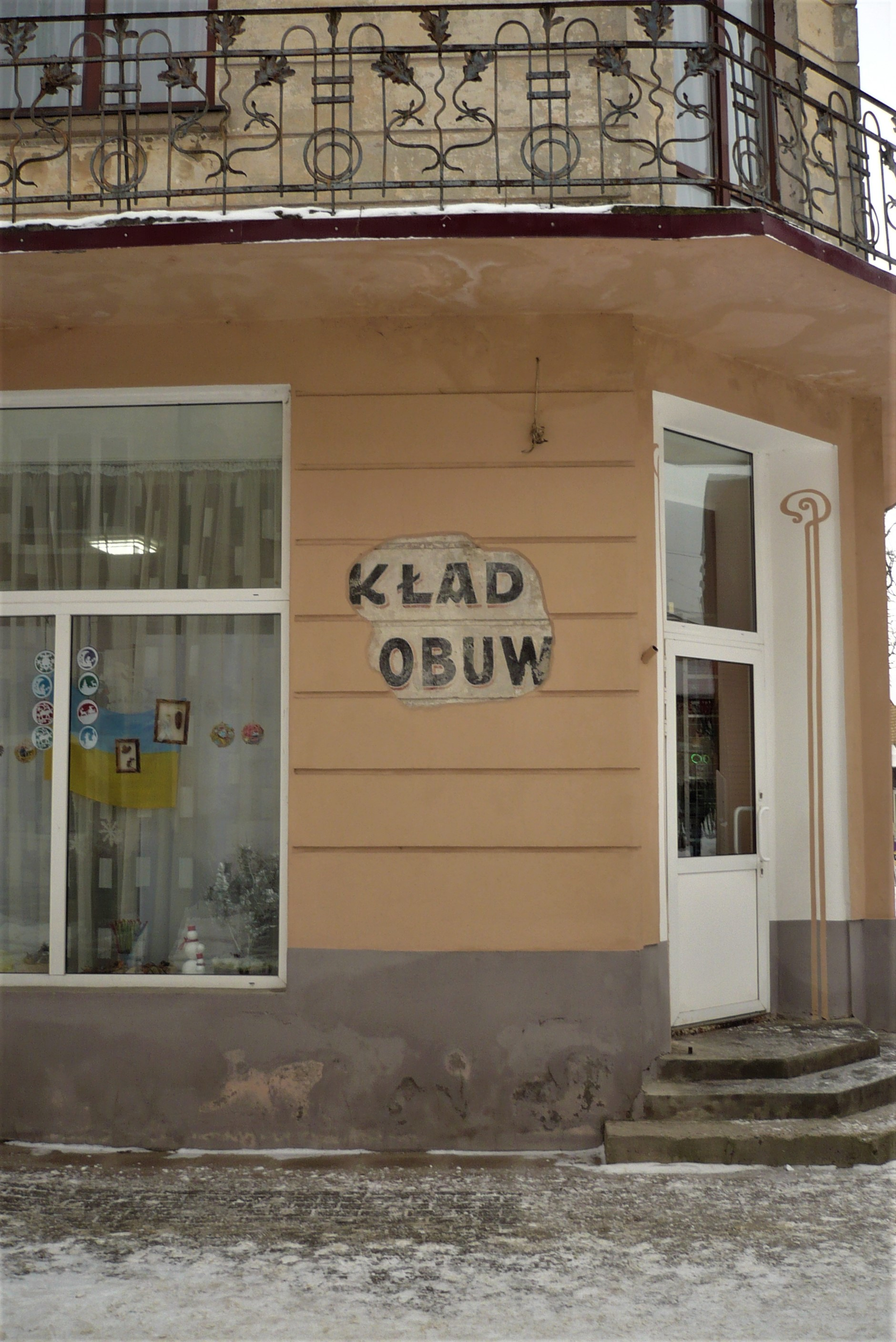 Skład